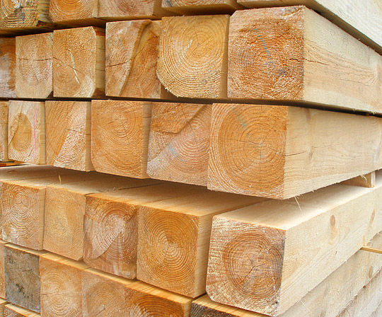 polski